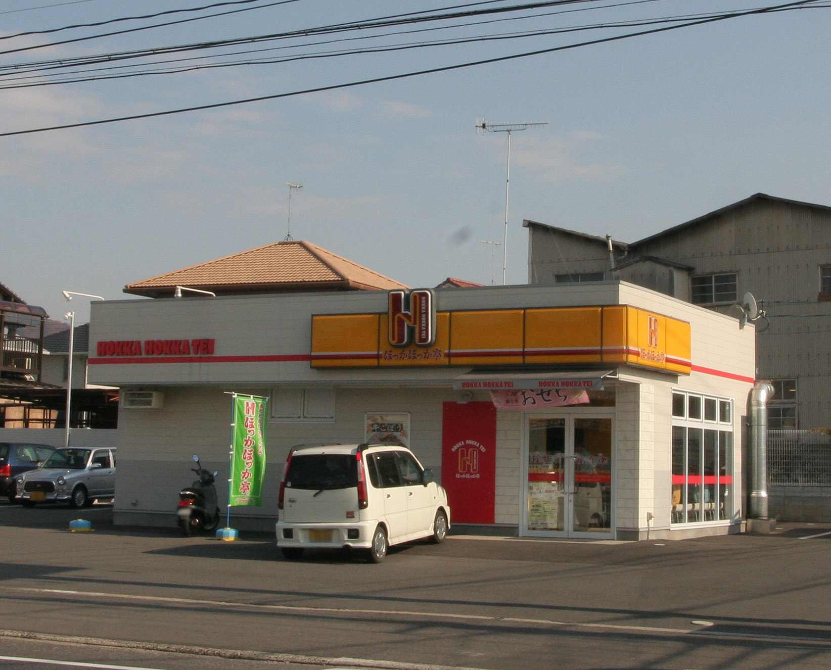 ほっかほっか亭 倉敷江長店